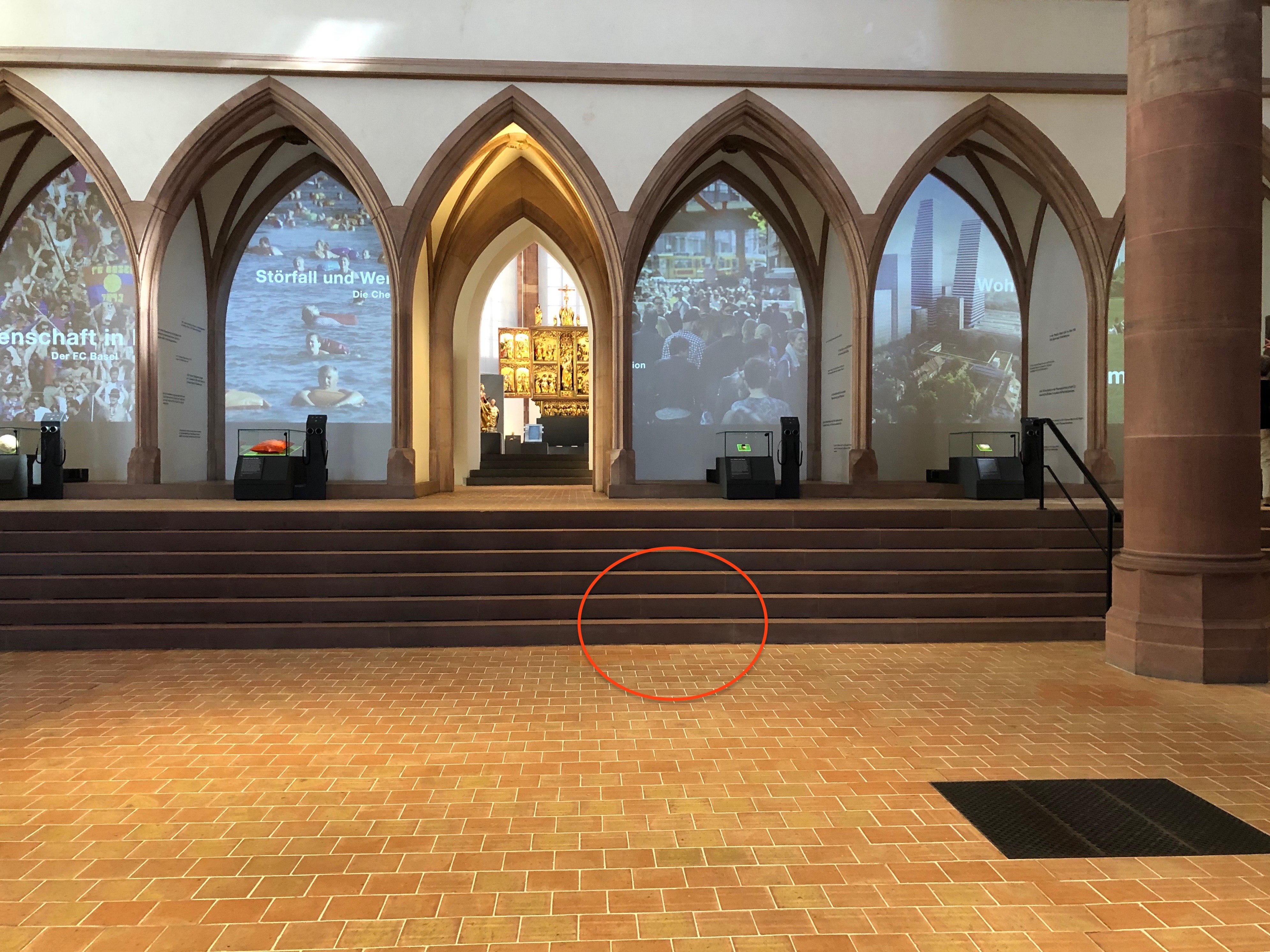 Historisches Museum Basel; ungefährer Fundort des Grabes von Anna Catharina Bischoff